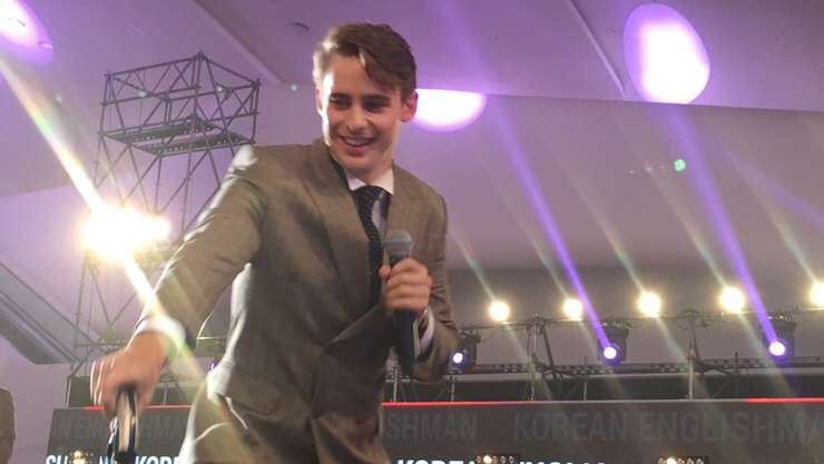 2015년 08월 28일 동대문디자인플라자(DDP) 알림 2관에서 열린 2015 YouTube FanFest Korea에서 행사중인 영국 남자(조슈아 캐럿)